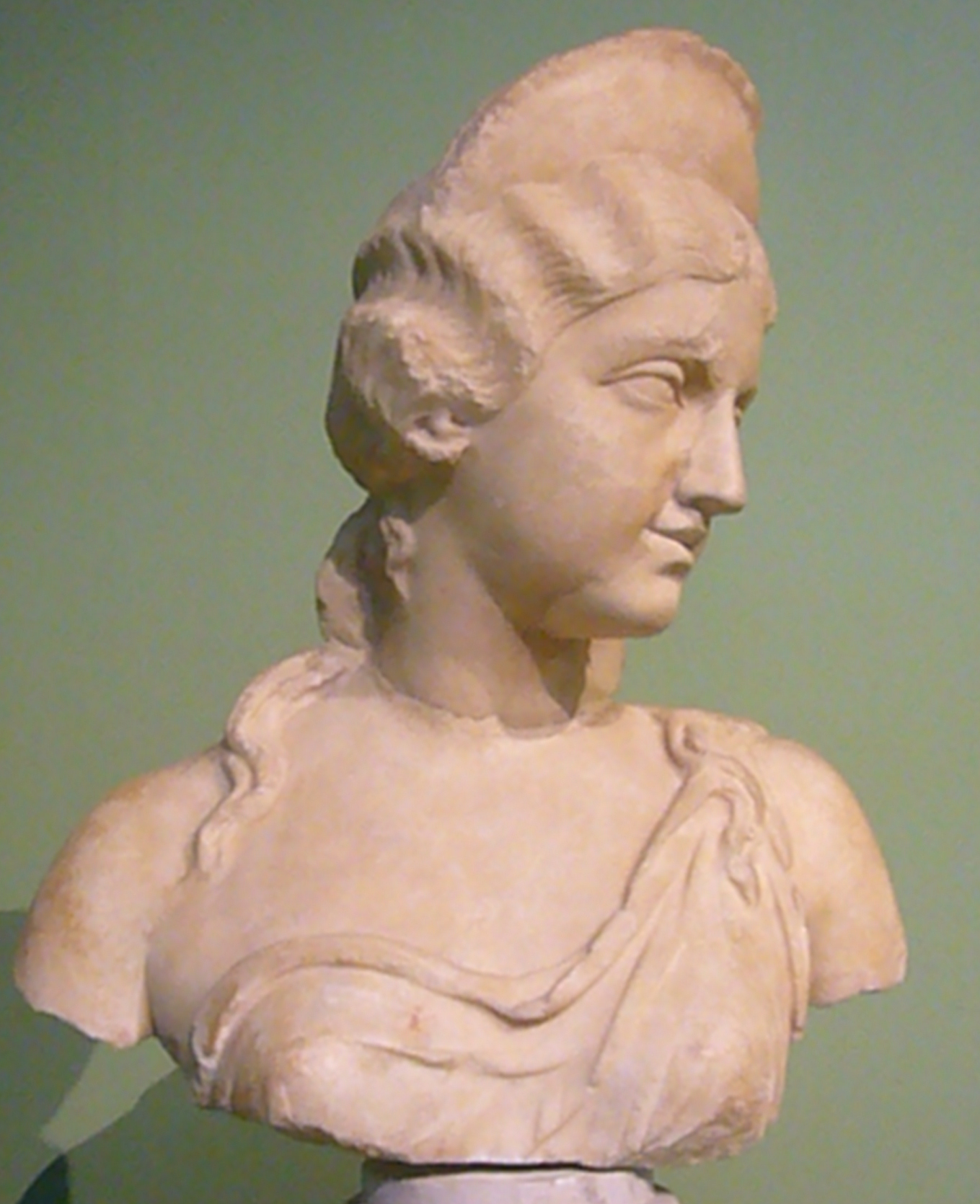 Roma, Centrale Montemartini: Annia Lucilla (dagli scavi per il traforo del Quirinale, 1901)